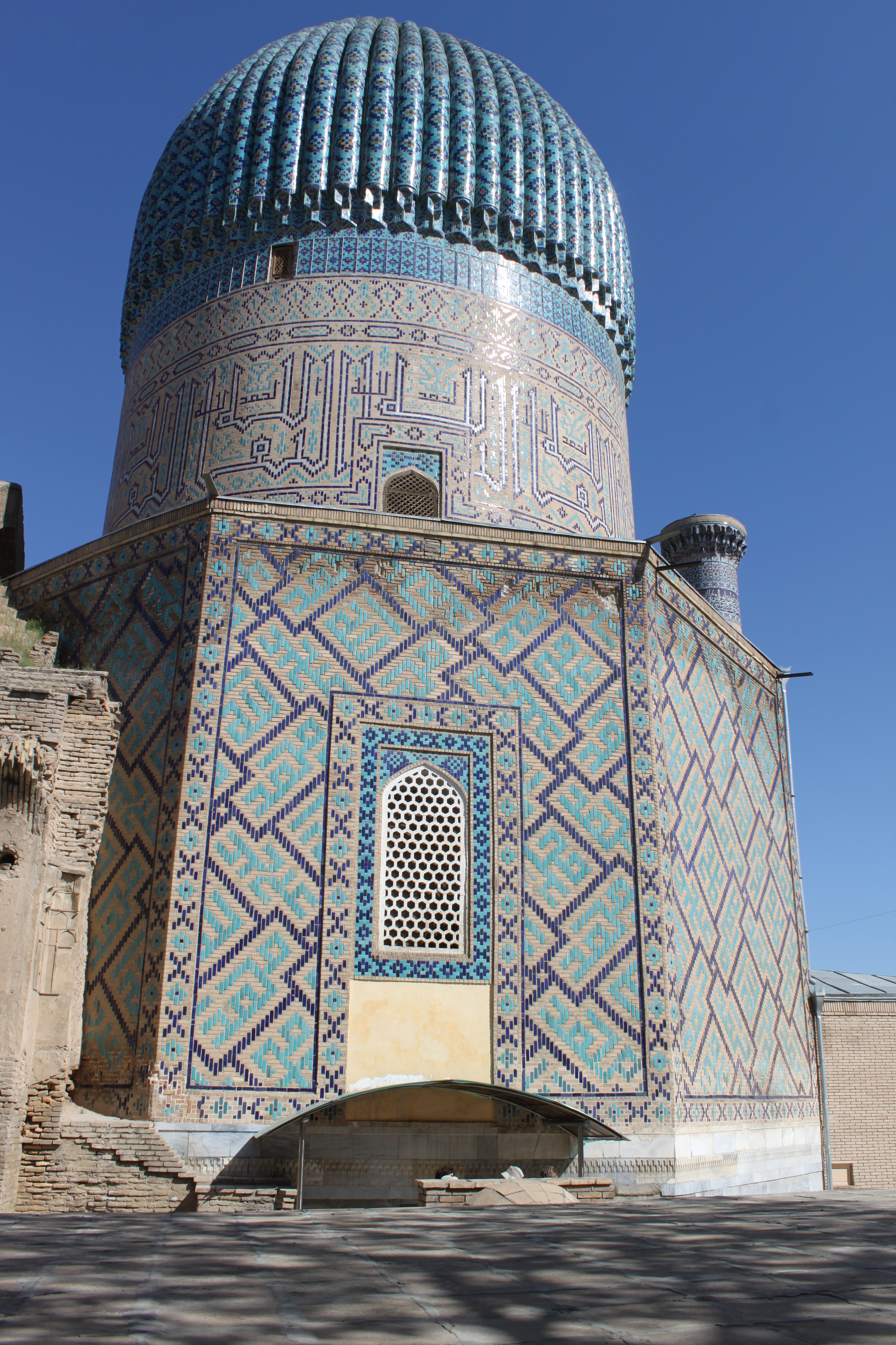 Extérieur de Gour Emir